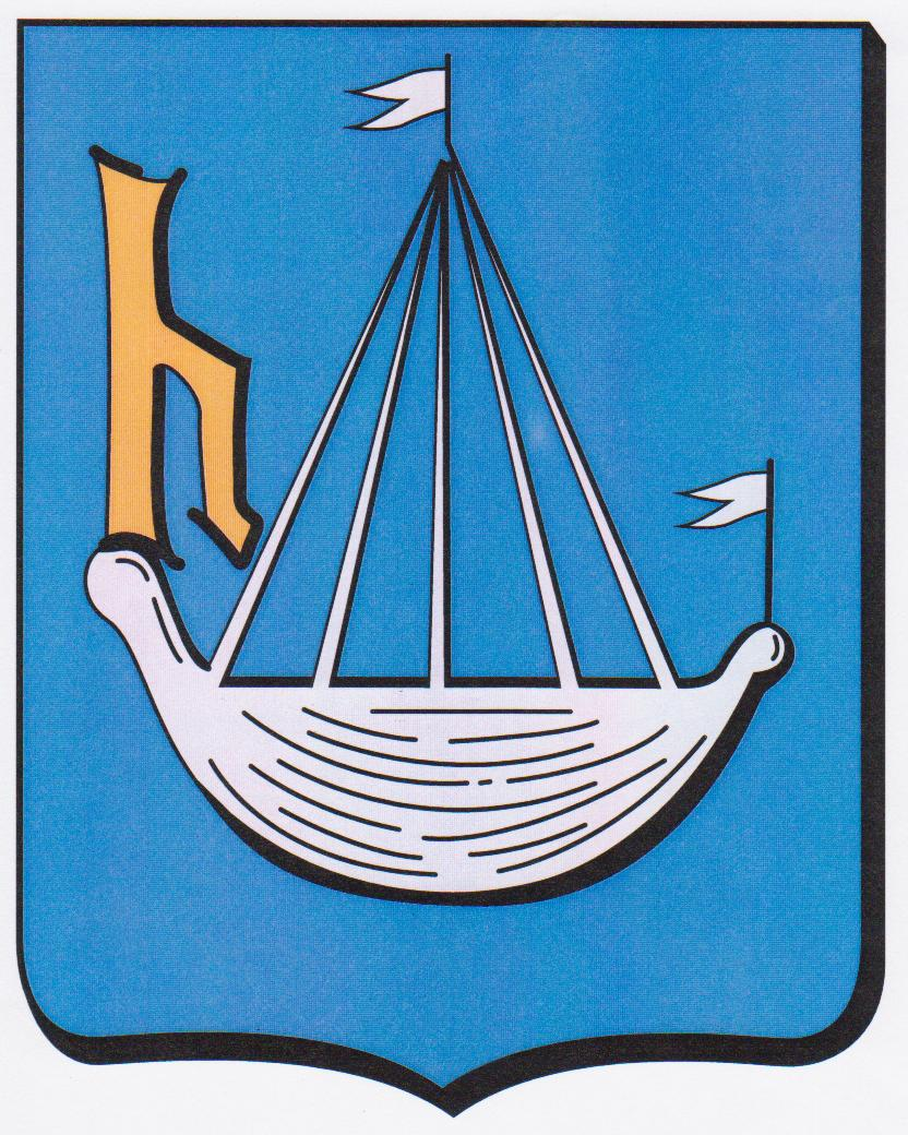 Blason d'Herment (63470)